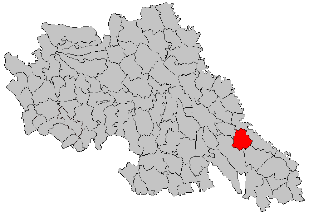 Categorie:Hărţi ale judeţului Iaşi